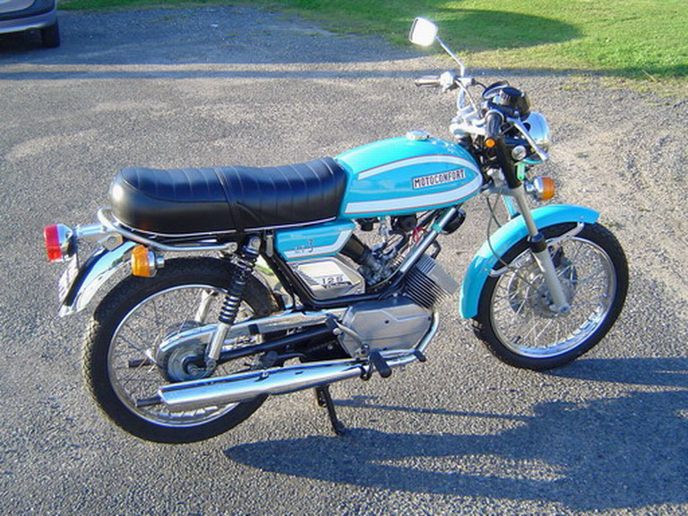 125 LT3 restaurée